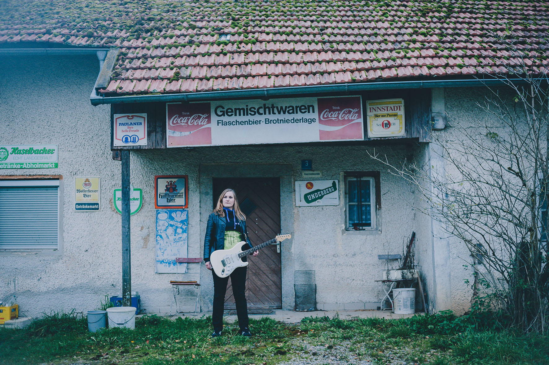 Die niederbayerische Sängerin und Gitarristin Karin Rabhansl. Das Foto wurde in Trautmannsdorf im Bayerischen Wald aufgenommen.